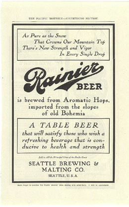 Rainier Beer advertisement